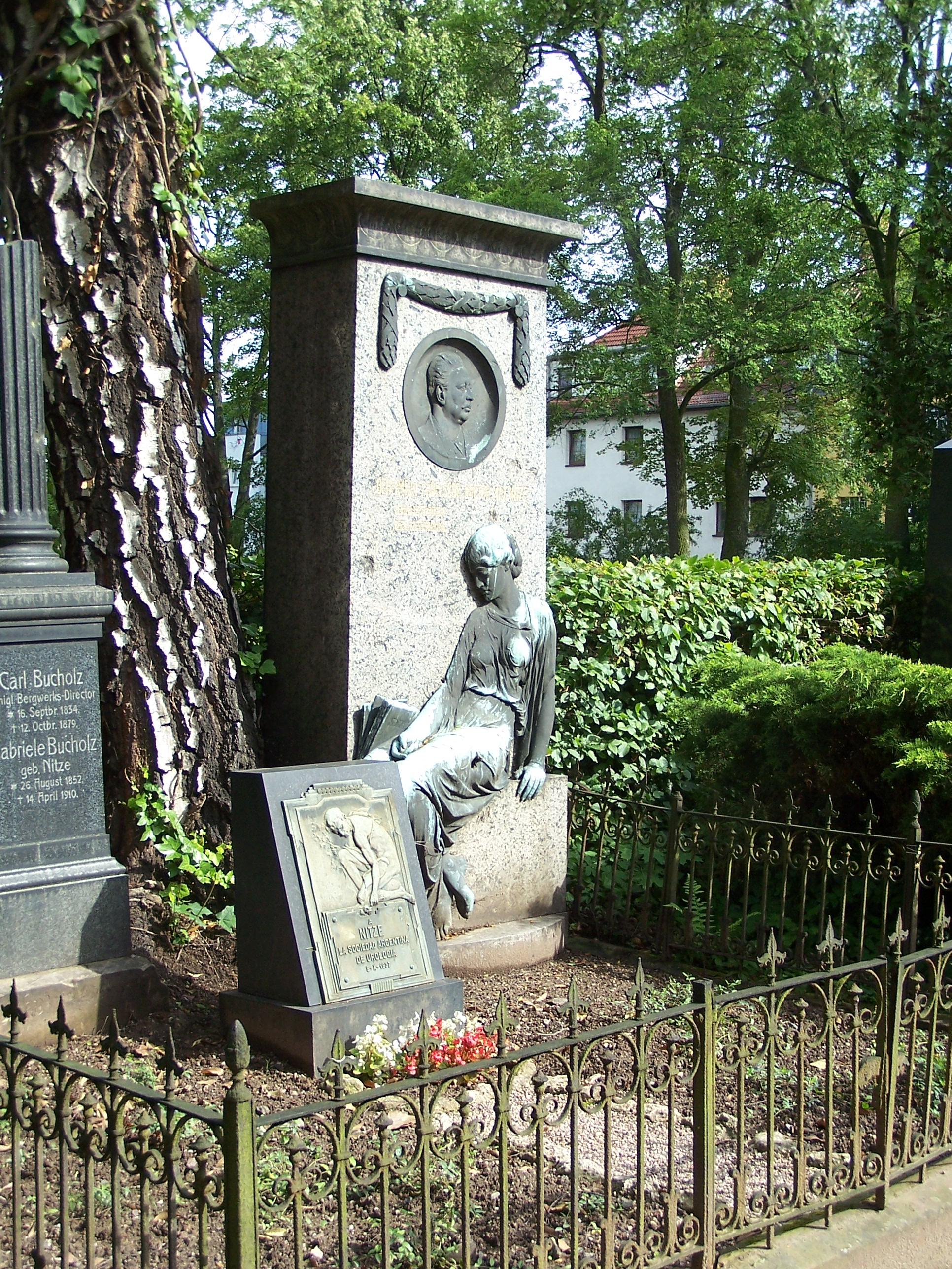 Das Grab des Urologen Max. Nitze mit einer zusätzlichen Gedenktafel der Argentinischen Urologischen Gesellschaft.